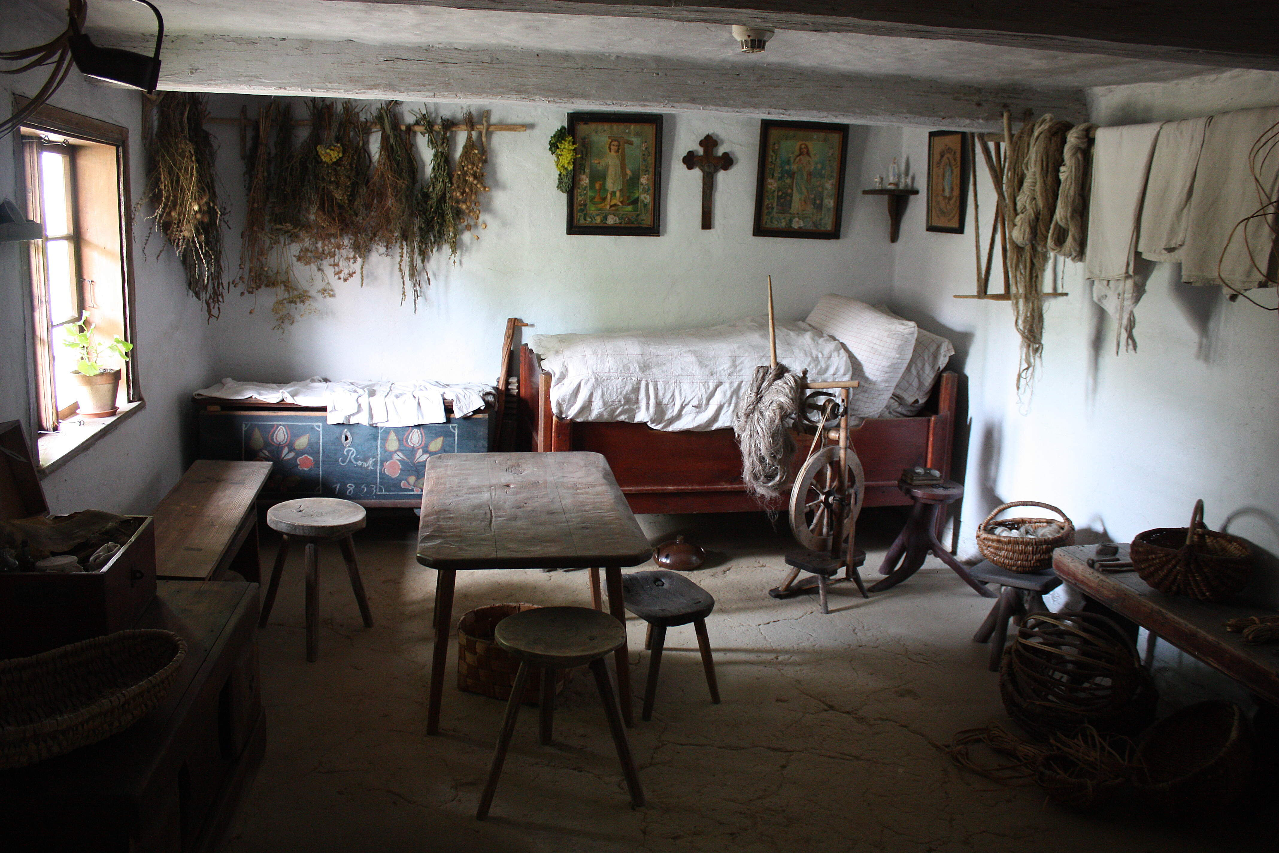 Toruń - Park Etnograficzny - chata rybaka, wnętrze